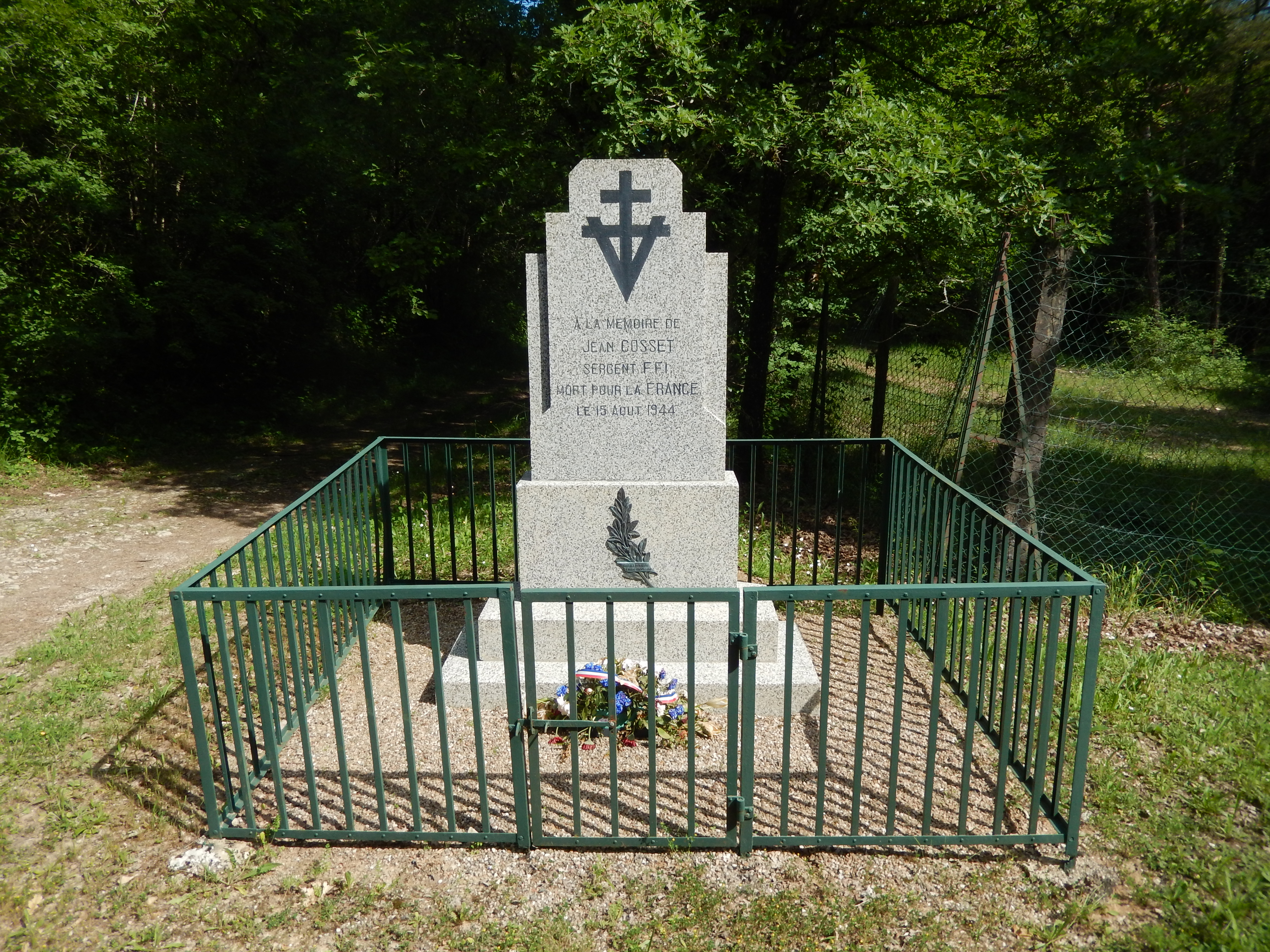 Une stèle en mémoire du résistant rochelais Jean Cosset, sergent des Forces Françaises de l'Intérieur, assassiné près d'Aubigné le 15 août 1944.